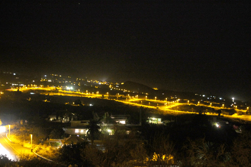 Industriegebiet oberhalb Todoque bei Nacht